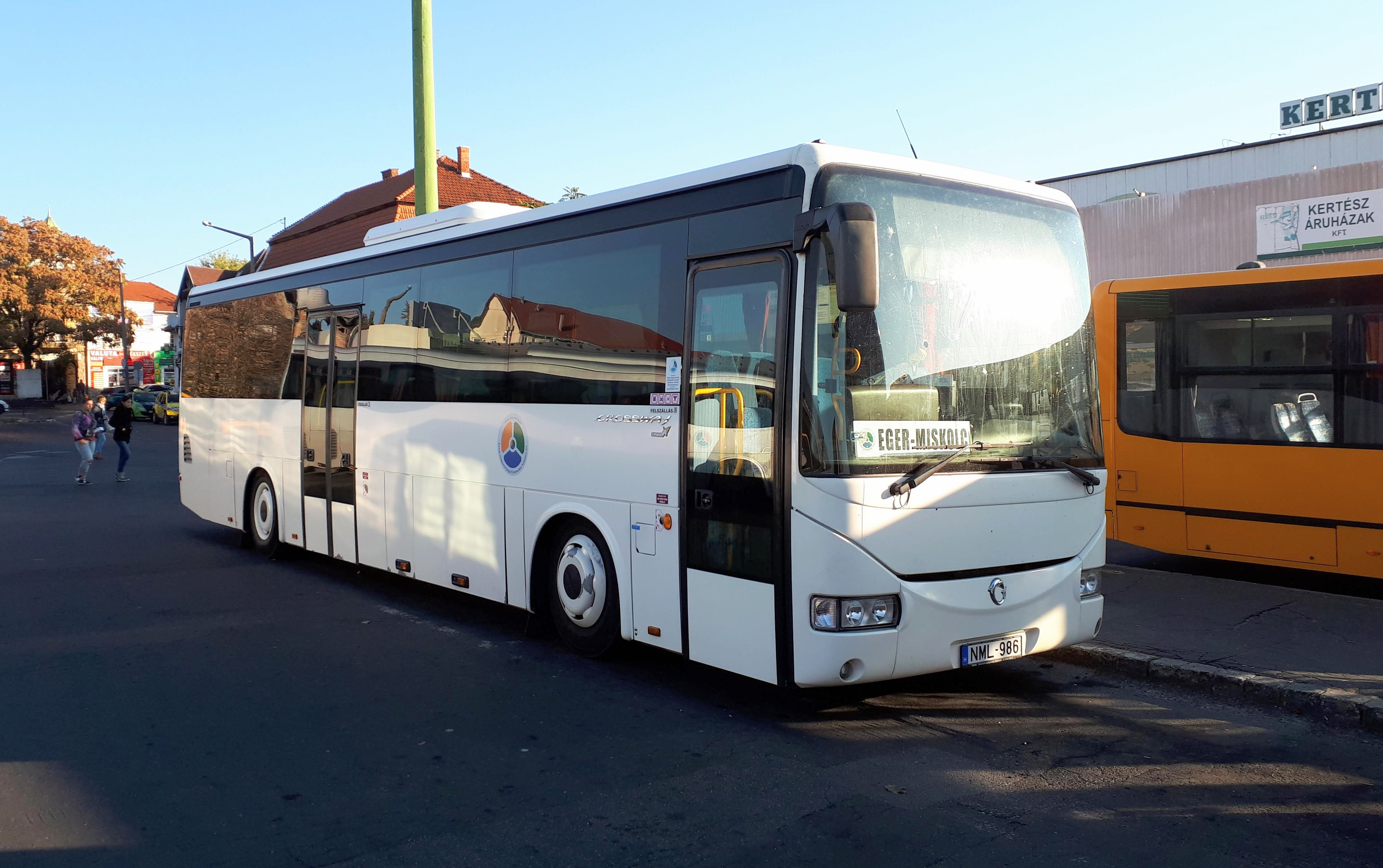 Az ÉMKK NML-986 rendszámú Irisbus Crossway 12M típusú busza Miskolcon, a 1380-as helyközi járaton.